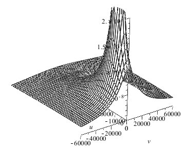 Absolute waarde van de systeemfunctie. De pool is zichtbaar als de piek. De nul ligt op oneindig.